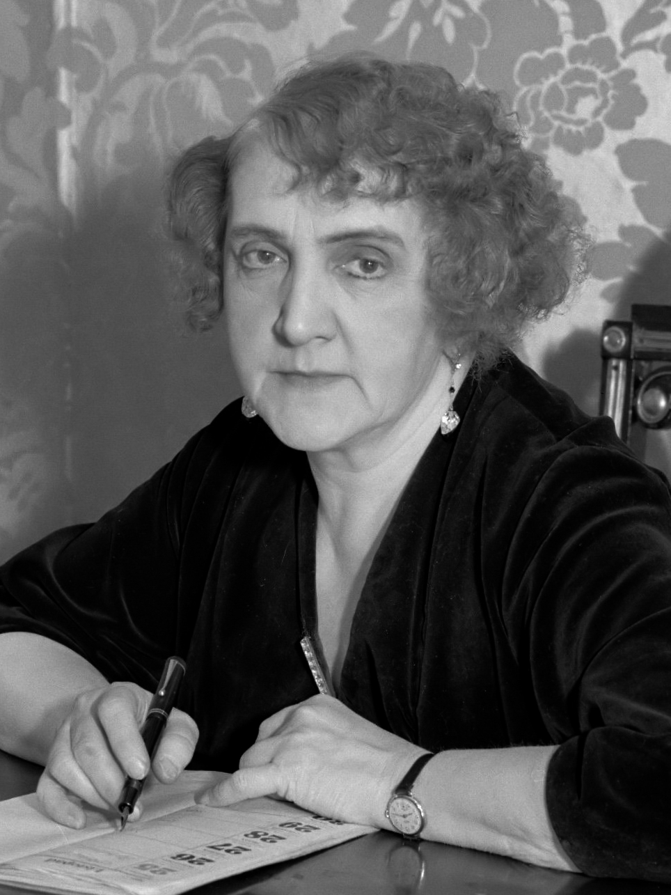 Janina Korolewicz-Wayda, de directrice van de Warschauer opera, in haar werkkamer 1934